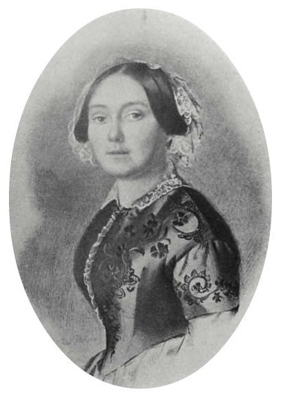 Варвара Павловна Верман, ур. Купреянова (18.10.1823—13.04.1889)